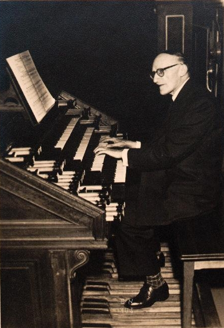 Édouard Mignan (1884-1969) à l'orgue de l'église de la Madeleine (Paris)